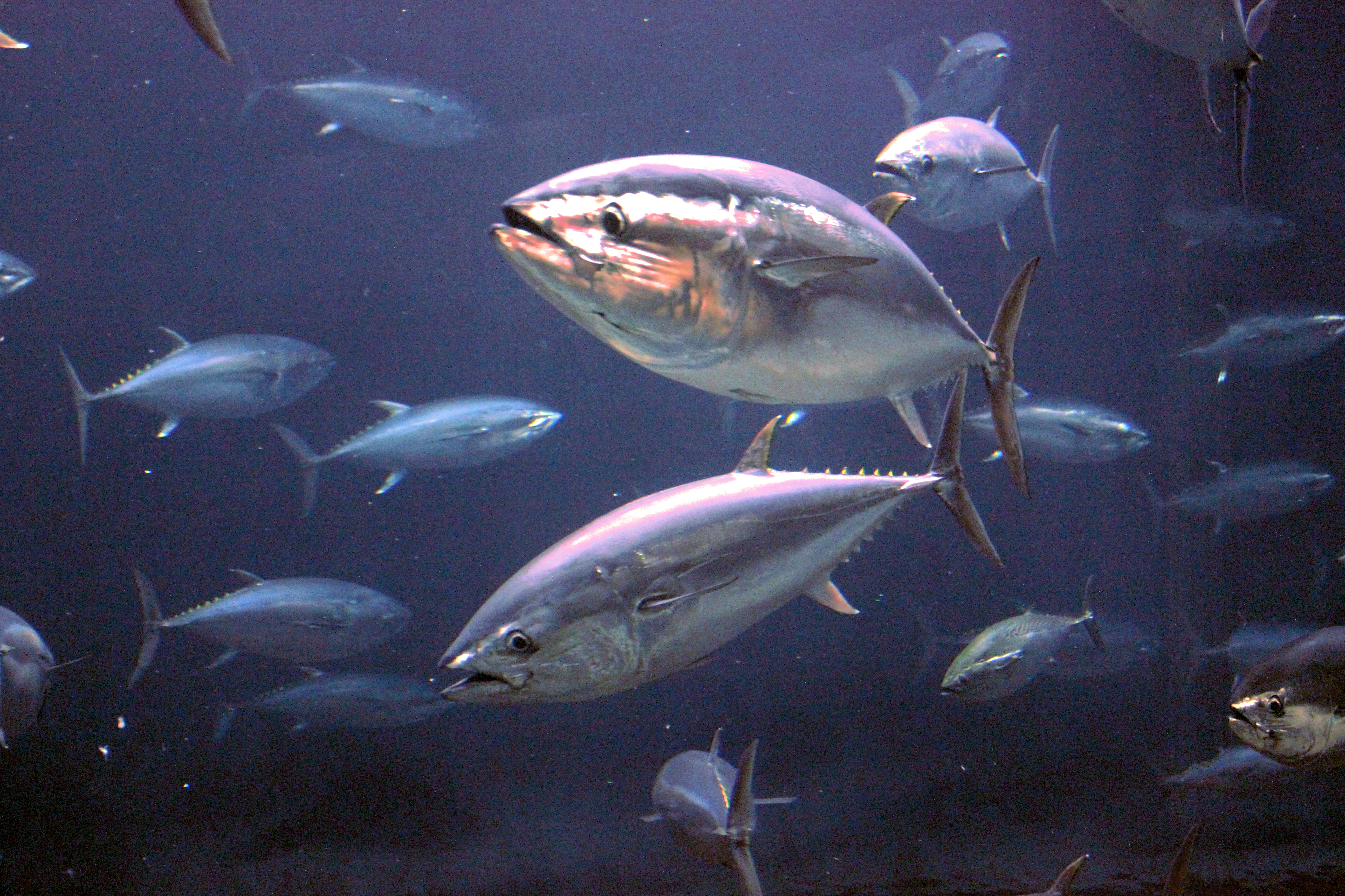 Tuna Tank